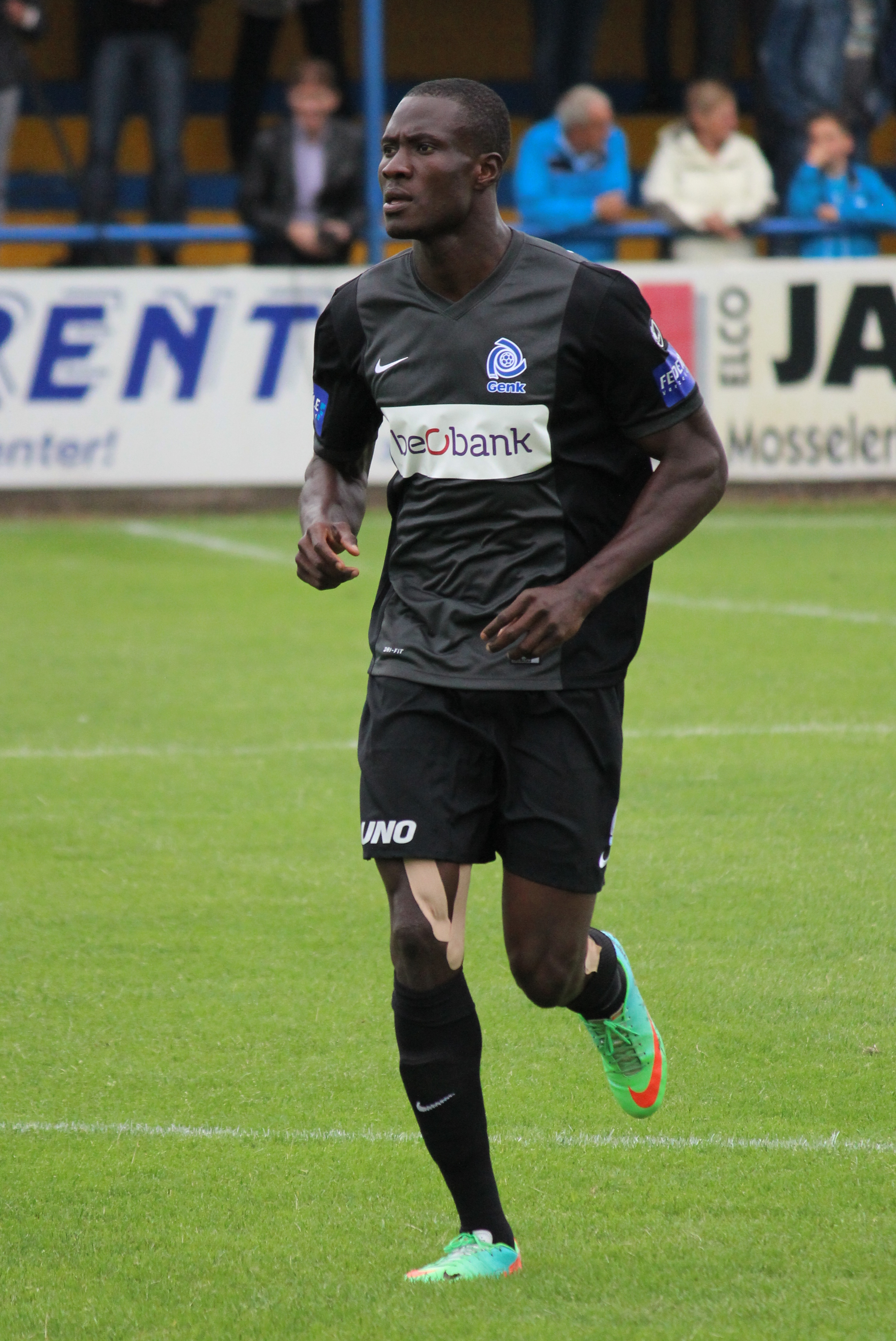 Kim Ojo